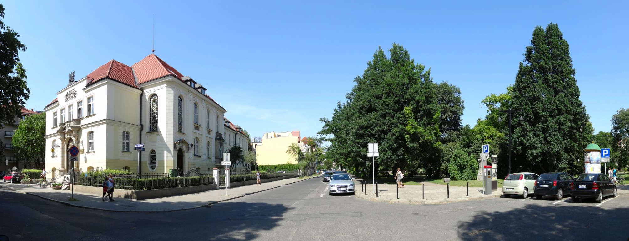 Zespół Urzędu Powiatowego, zbud. 1904-1906, ob. budynek główny Akademii Muzycznej w Bydgoszczy przy ul. Słowackiego. Panorama z parkiem im. Jana Kochanowskiego